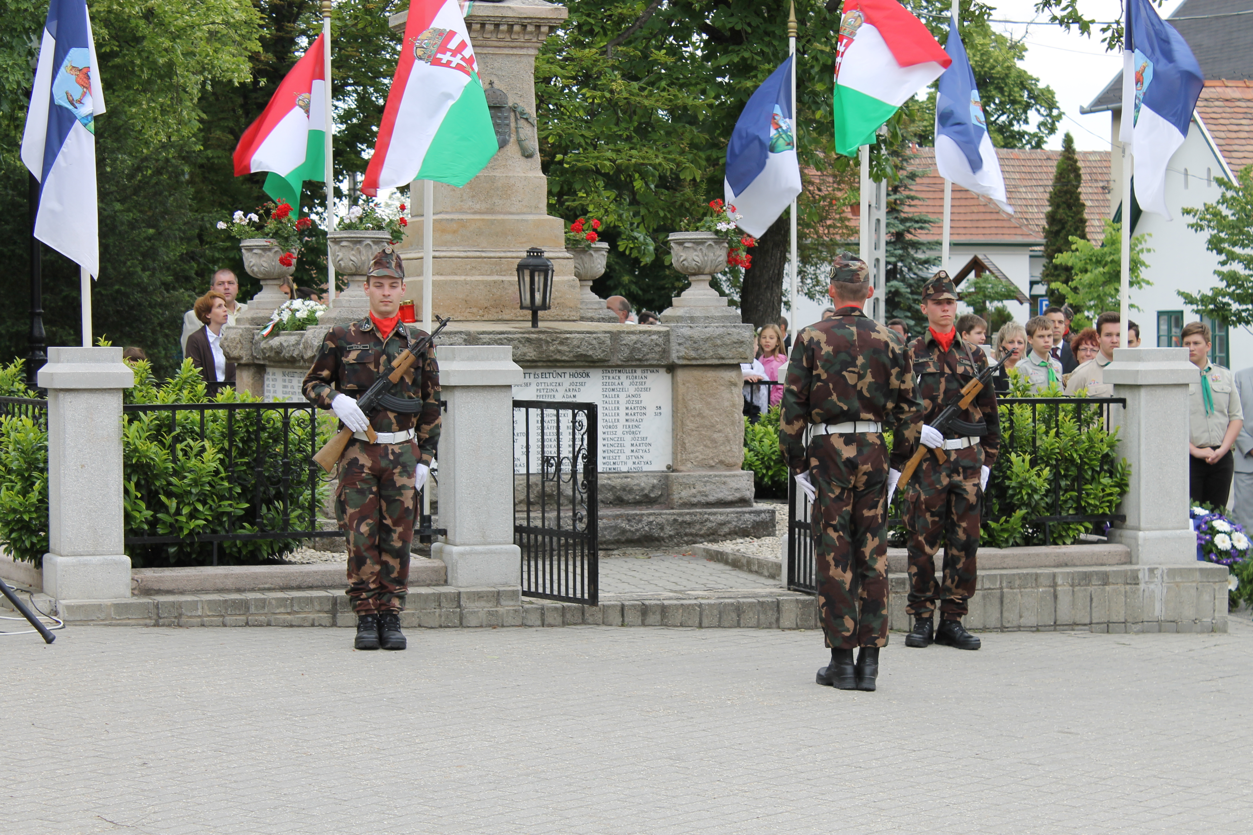 Hősök Napja